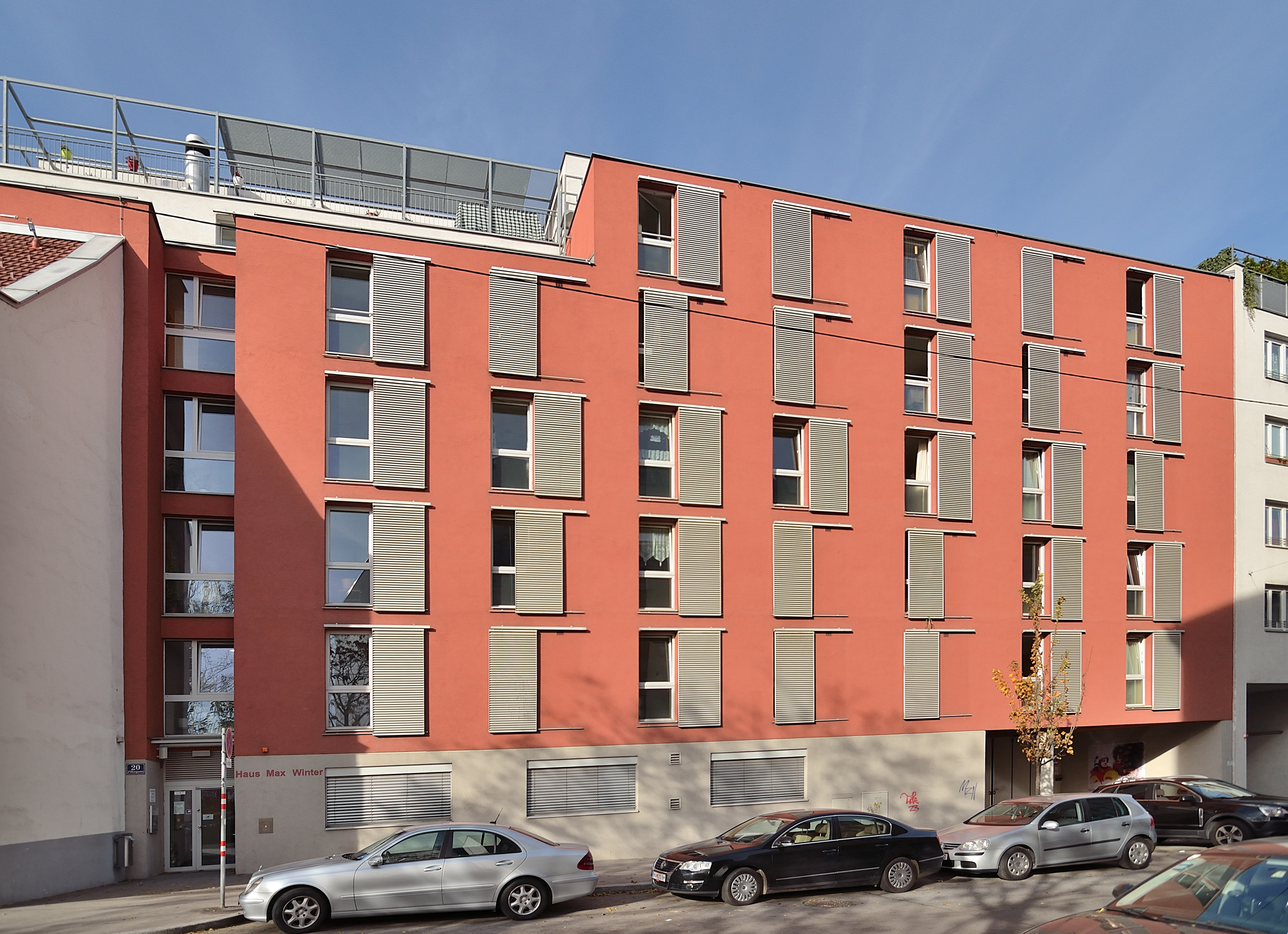 Das Haus Max Winter ist ein Wohnprojekt für ehemals Obdachlose in der Pillergasse 20 in Wien Rudolfsheim-Fünfhaus und wird von Samariterbund betrieben.